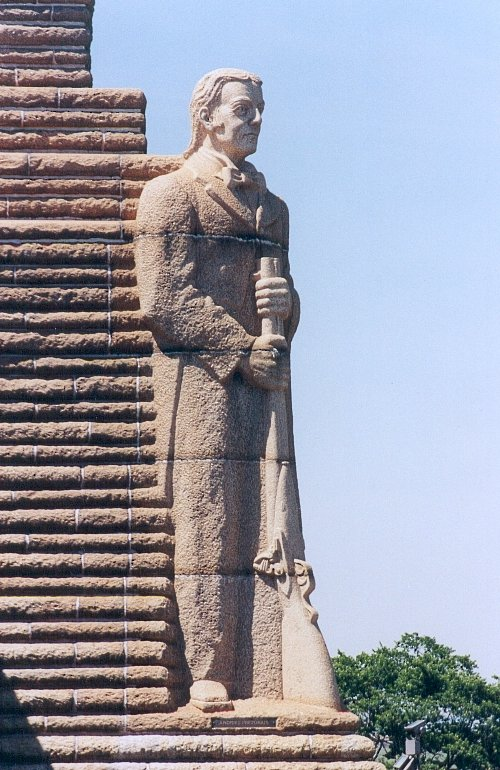 Standbeeld van Andries Pretorius by die Voortrekkermonument, Pretoria